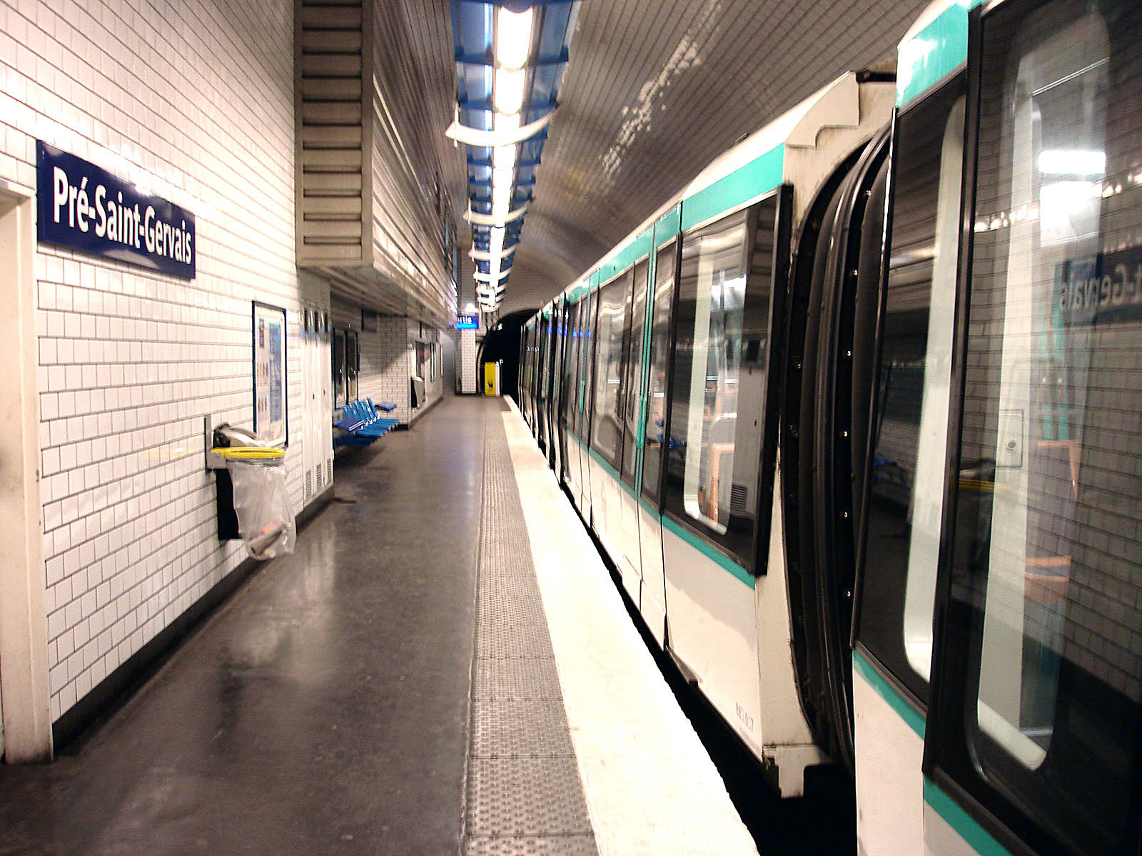 Station Pré-Saint-Gervais de la ligne 7 bis du métro de Paris, France.